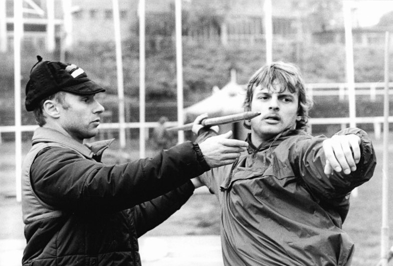 Torsten Voß beim Training ADN-ZB Pätzold-21.11.85- ma-Schwerin: Serie Zehnkämpfer Torsten Voss - Trainingsalltag für den 22jährigen Zehnkämpfer Torsten Voss. Warm verpackt wirft er einen Leichtmetallspeer nach dem anderen durch die frostige Luft. Gemeinsam mit Trainer Bernd Hahn (l.) werden Sauberkeit, Wurfhaltung und Schrittfolge ein ums andere Mal geprobt. Siehe dazu ADN-Meldungen vom 22.11.85 und Motive 1985-1121-21- und 23N.